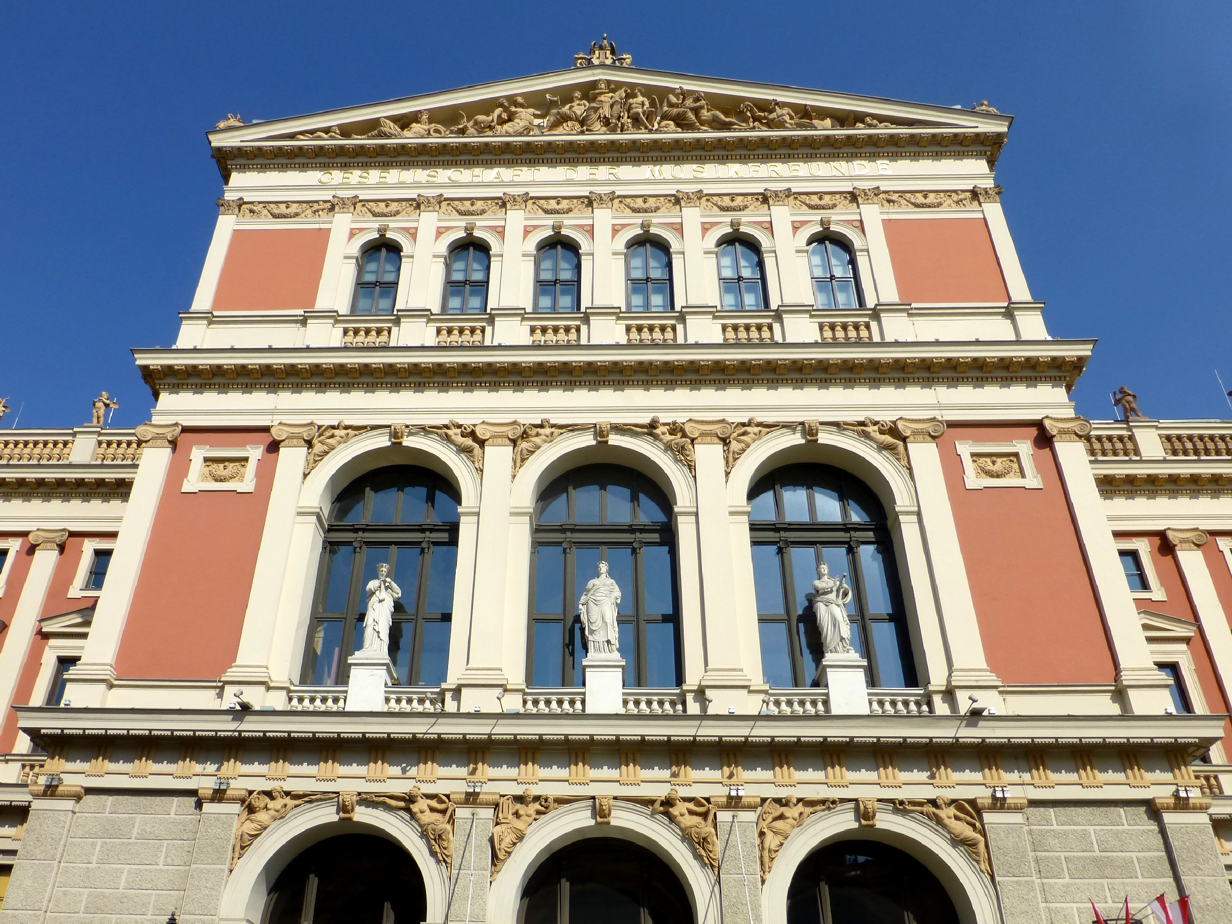 Musikverein Wien Austria